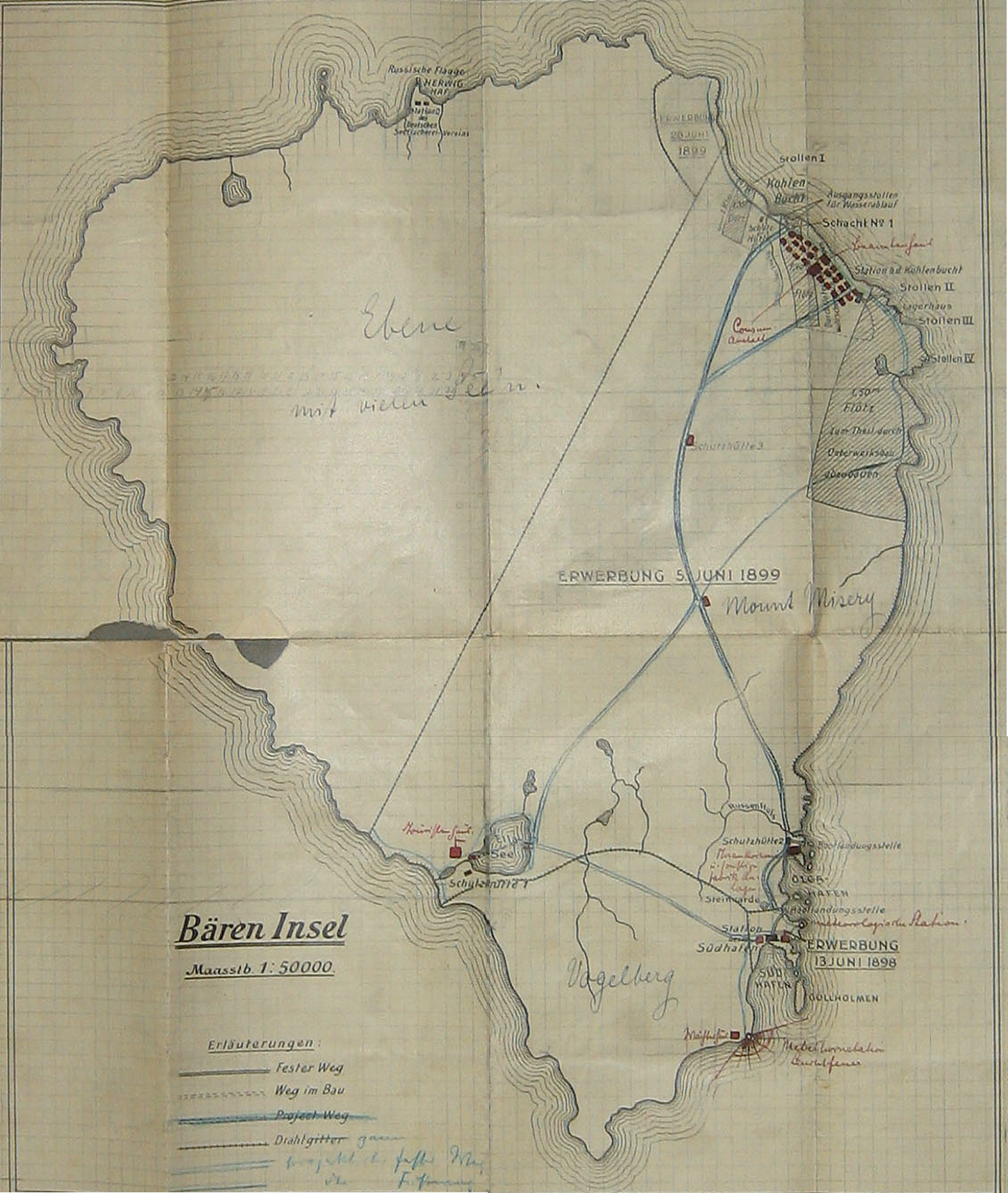 Karte von Bjørnøya, erstellt von Theodor Lerner